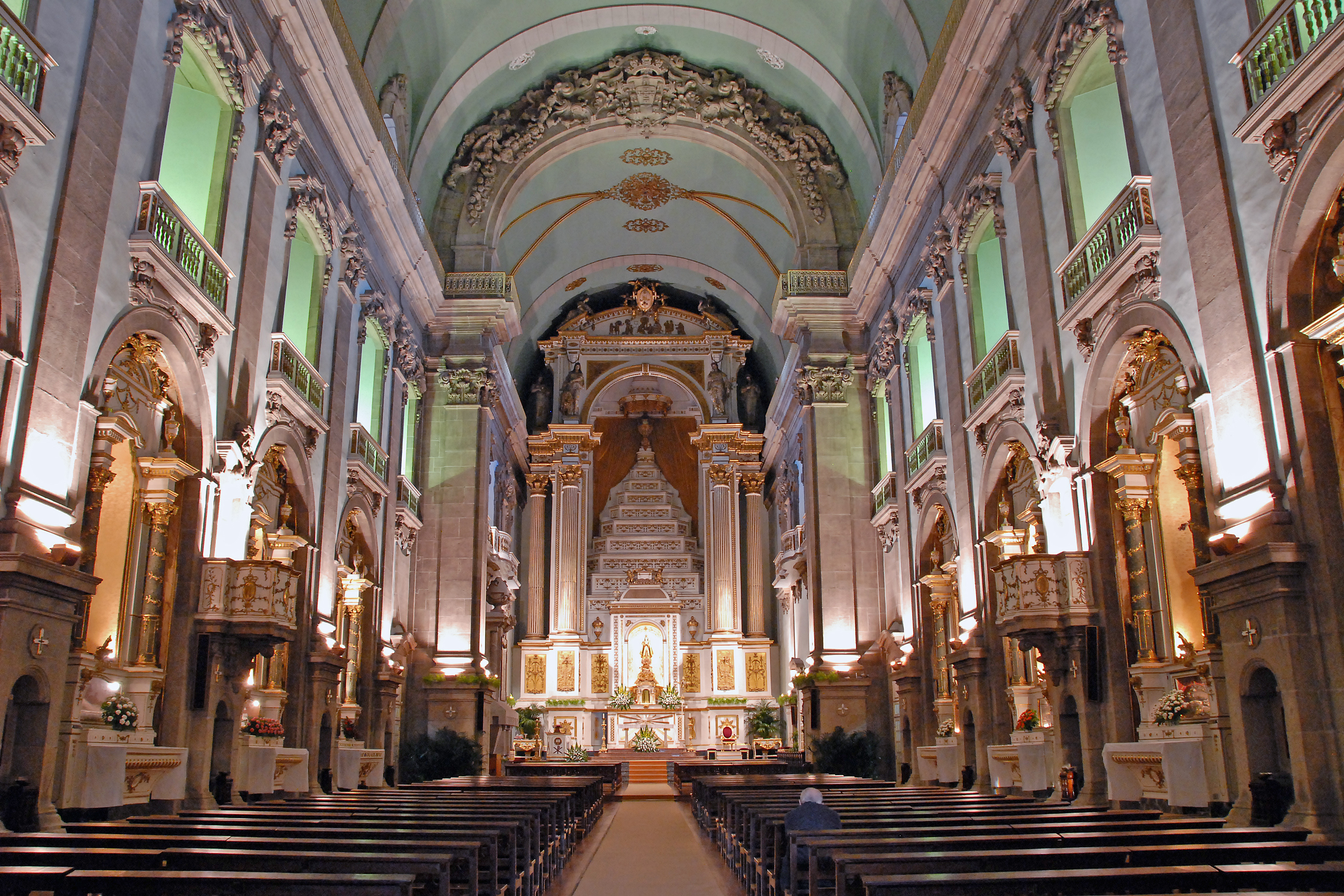 Igreja da Veneravel Irmandade de Nossa Senhora da Lapa